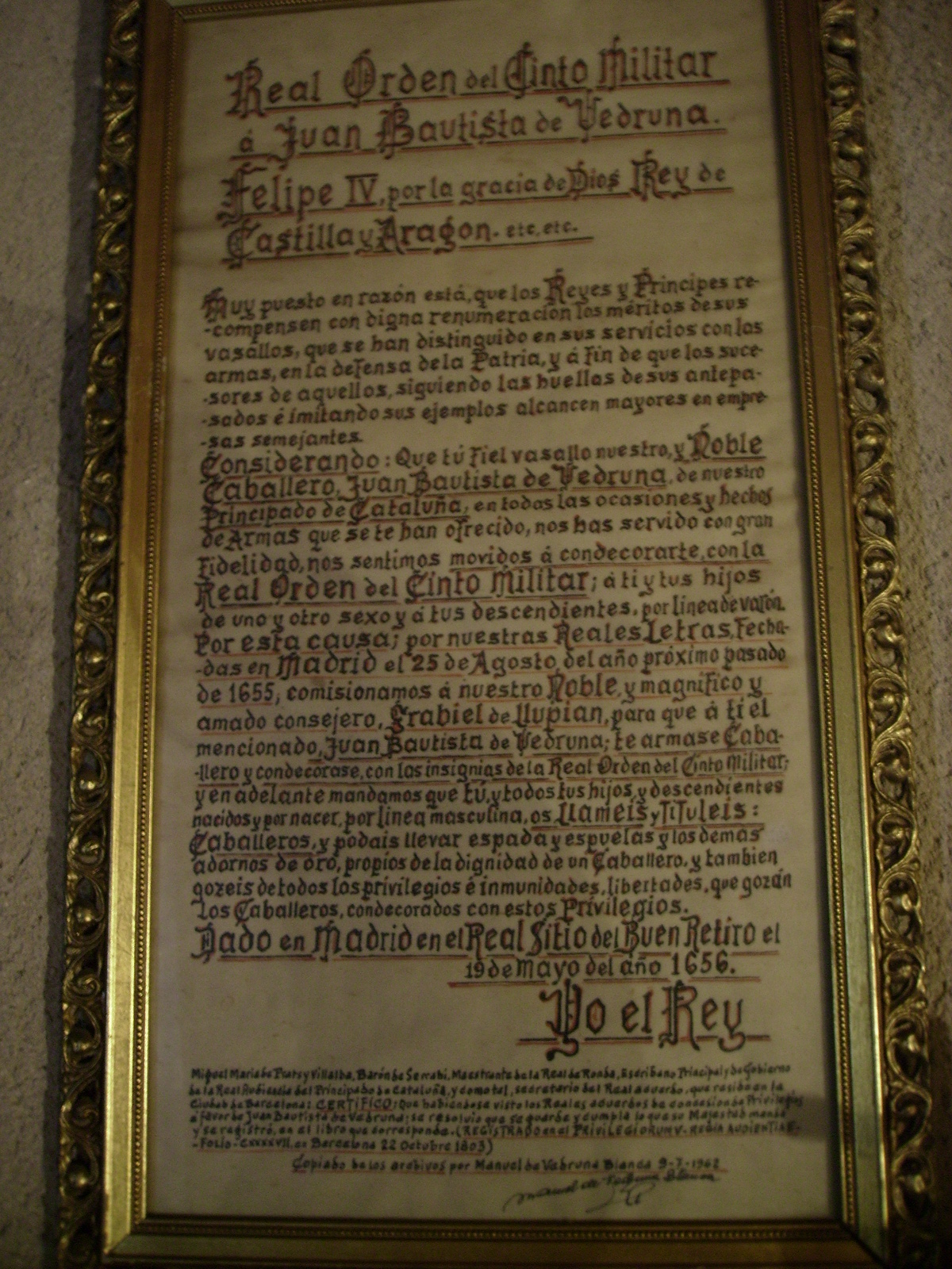 Documento de ennoblecimiento del ciudadano Juan Bautista de Vedruna (y todos sus descendientes de ambos sexos), antepasado directo de la Santa Joaquina de Vedruna por el rey Felipe IV en 1656. (foto de la familia Viala)